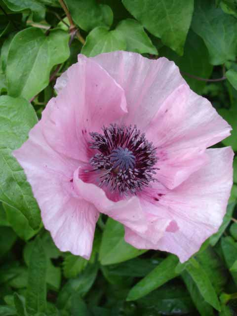 Papaver 'Papillion'